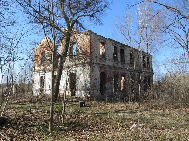 Арэхаўск. Сядзіба Хлюсціных